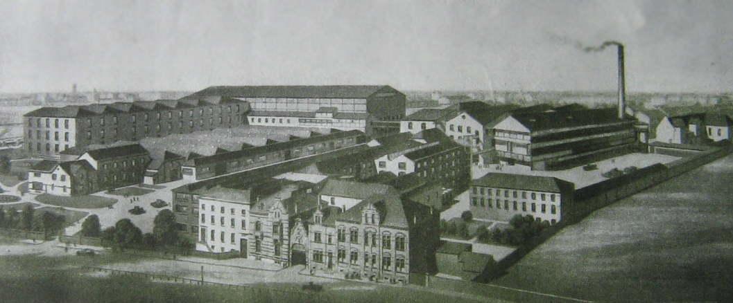 Ancienne Tannerie Van Cutsem